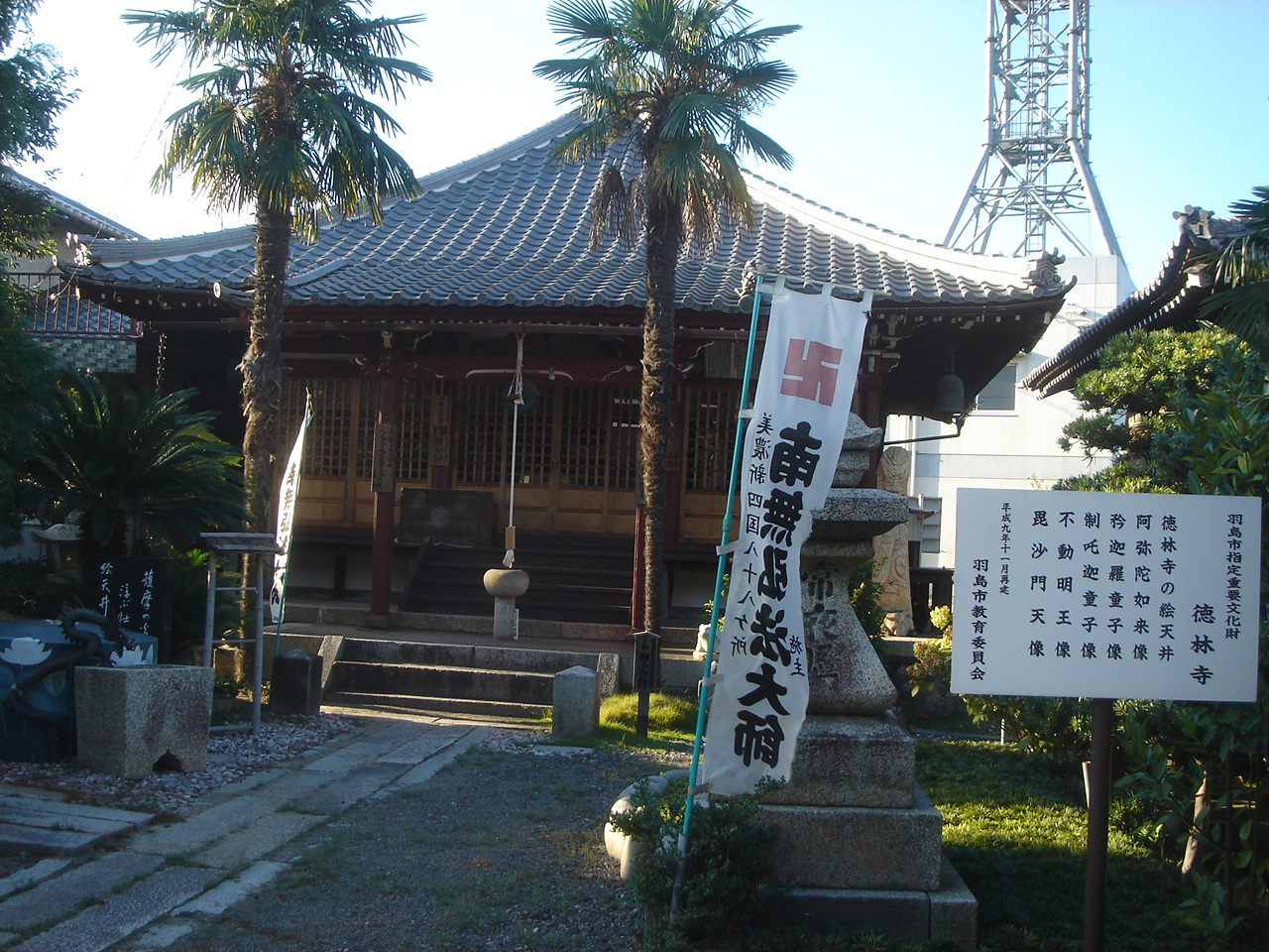 Tokurin-ji(Temple) in Hashima city(徳林寺),Hashima,Gifu,Japan(岐阜県羽島市)で撮影。美濃四国第33札所